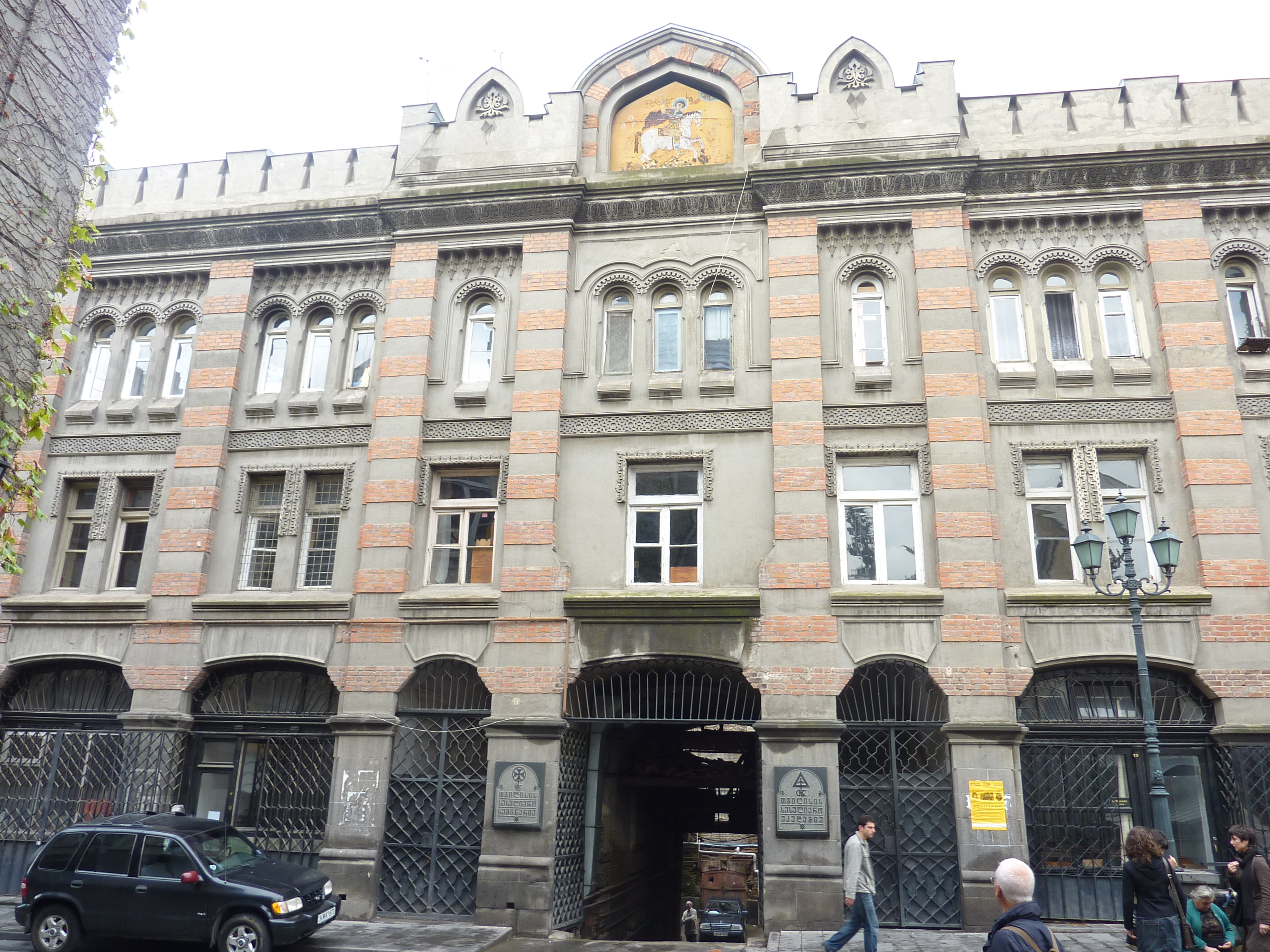 Tbilissi : façade d'un ancien caravansérail dans le centre de la ville près de l'ancienne cathédrale Sioni